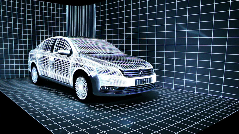 Projekcje na samochodzie w technice mappingu 3D